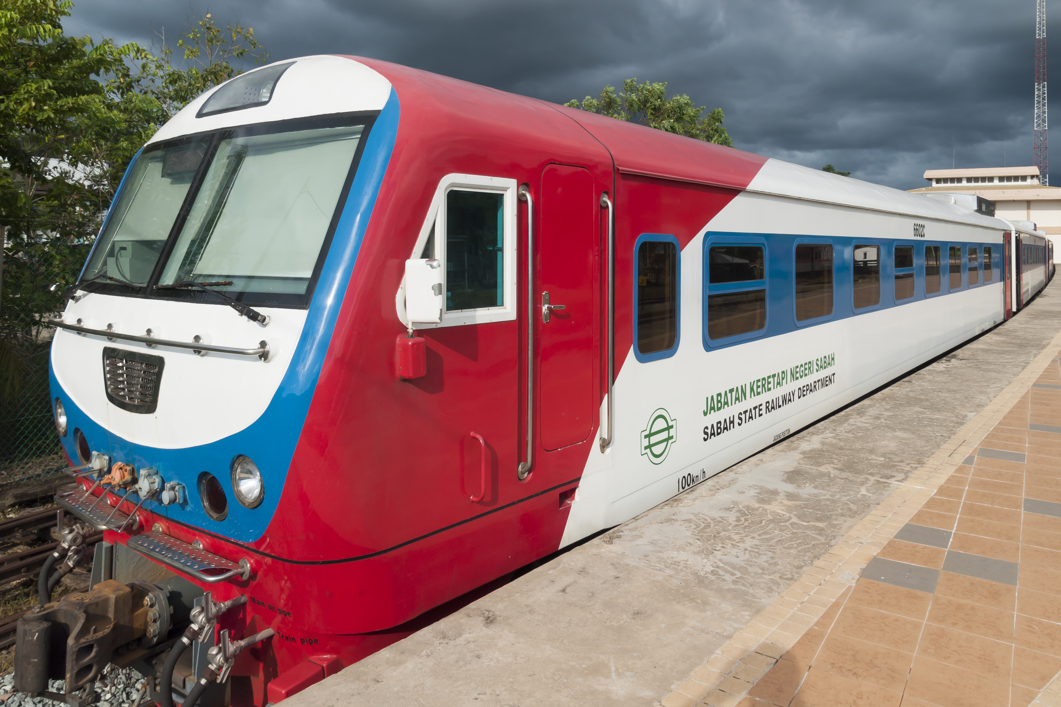 Beaufort Sabah: New trains of Sabah State Railway in 2011.